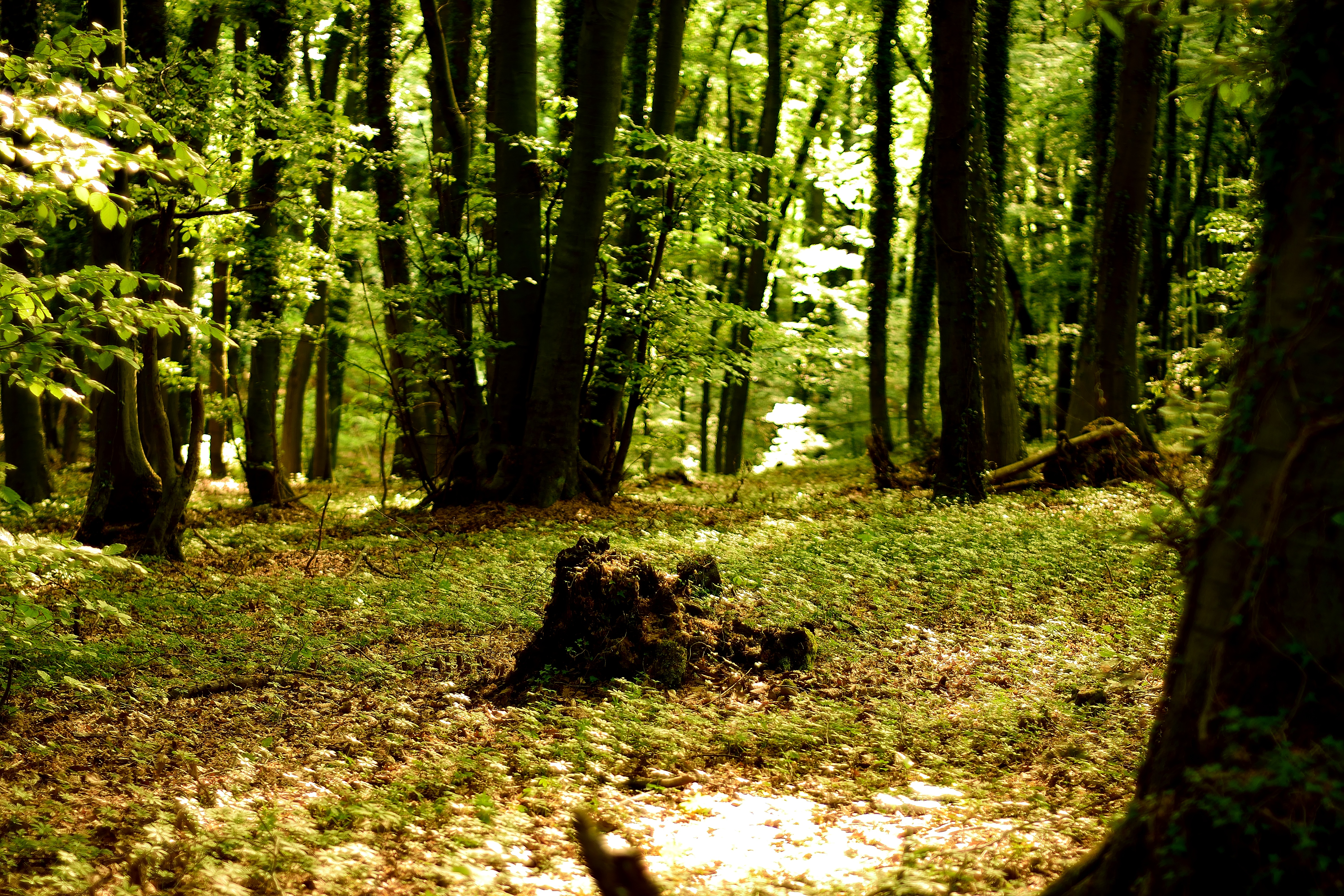 Intruper Berg Dieser tektonische außerordentlich bedeutsame Kalkstein-Höhenzug zwischen Lengerich und Lienen gehört zu einem über 100 km langen Ausläufer der in das nordwestliche Tiefland hineinziehenden Mittelgebirgsschwelle, die die münsterländische Bucht im Norden begrenzt. Waldmeister- Buchenwälder, bei denen es sich meist um durchgewachsene Niederwälder handelt und die in verschiedenen Bereichen große Orchideenbestände aufweisen, bedecken zusammen mit Fichtenparzellen die Hänge und Kammlagen. Mehrere naturnahe Quellbäche entspringen auf dem südexponierten Hang. Kalk-Halbtrockenrasen, die durch ihren Reichtum an Orchideen und anderen Blütenpflanzen besonders im Frühjahr ein buntes Bild bieten und eine Vielzahl von Insekten aufweisen, sowie Kalksümpfe und Kalktuffquellen mit seltenen Pflanzengesellschaften sind weitere zusätzliche schutzwürdige Lebensräume in stillgelegten und zum Teil schon sehr alten Steinbrüchen. (Quelle: )